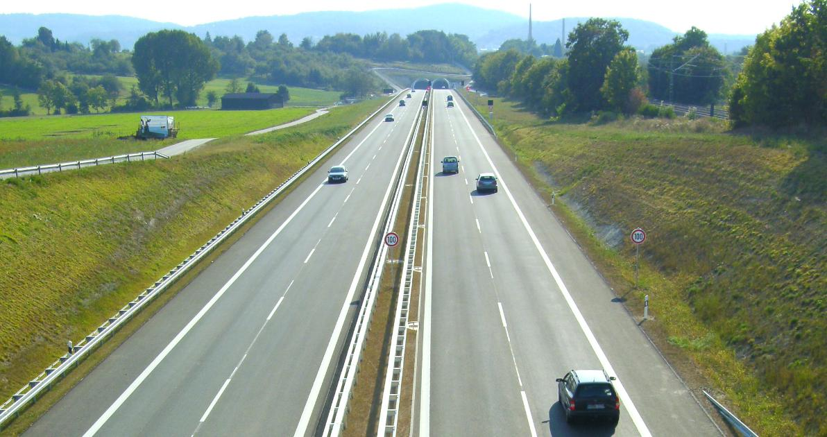 Die Ortsumfahrung Winnenden im Zuge der B14 unter Verkehr